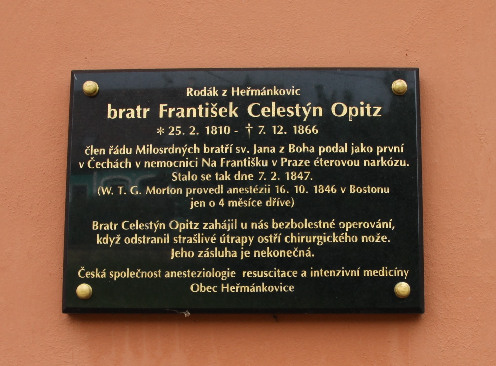 Pamětní deska bratra Františka Celestýna Opitze v Heřmánkovicích, okres Náchod